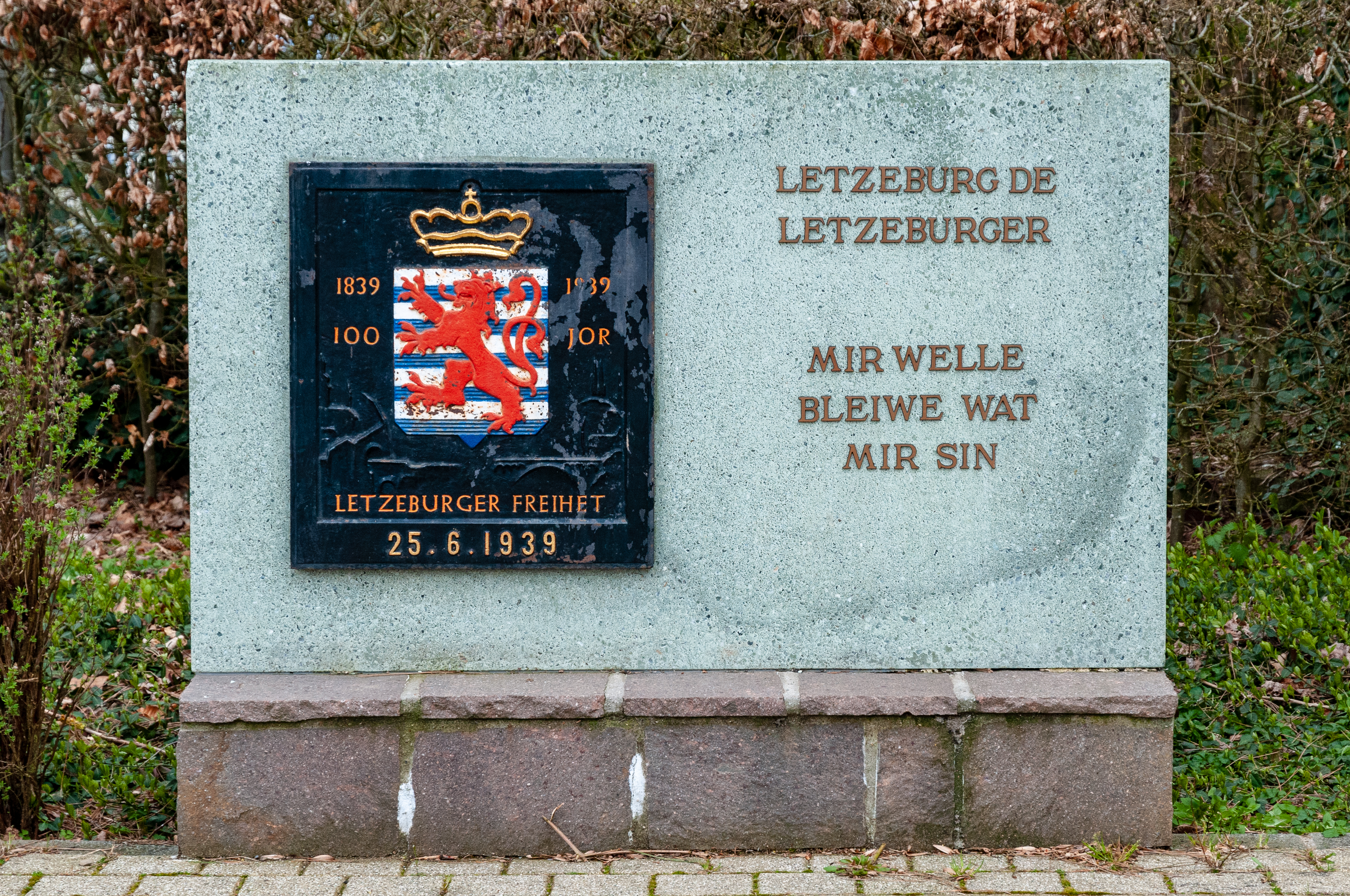 Lëtzebuerg de Lëtzebuerger a Mir wëlle bleiwe wat mir sinD'Onofhängegkeetsmonument vun 1939 bei der Märei an der Schoulstrooss zu Bauschelt.